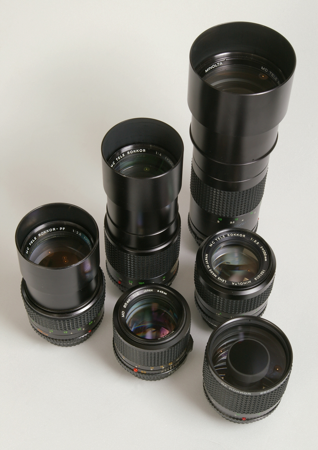 Einige Teleobjektive für manuelle Spiegelreflexkameras mit dem Minolta-SR-Bajonett. Vorn ein Spiegeltele 5,6/250 mm. Zweite Reihe typische Portraitteleobjektive mit 85 mm und 100 mm Brennweite. Hinten längere Brennweiten (135 mm, 200 mm, 300 mm) mit integrierten, herausgezogenen Streulichtblenden.